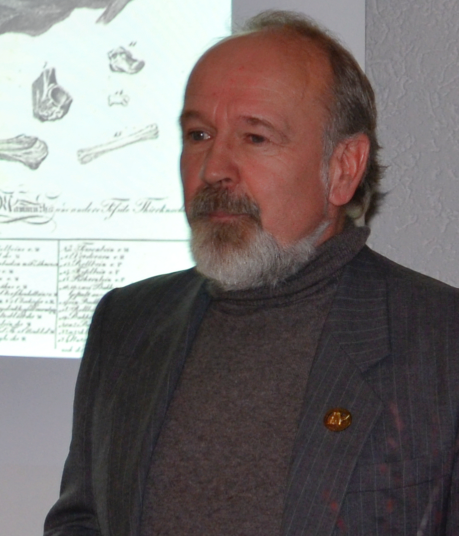 Bei der wissenschaftlichen Tagung zu den Harzhöhlen und ihr Kulturerbe am 14. Oktober 2016 in Scharzfeld